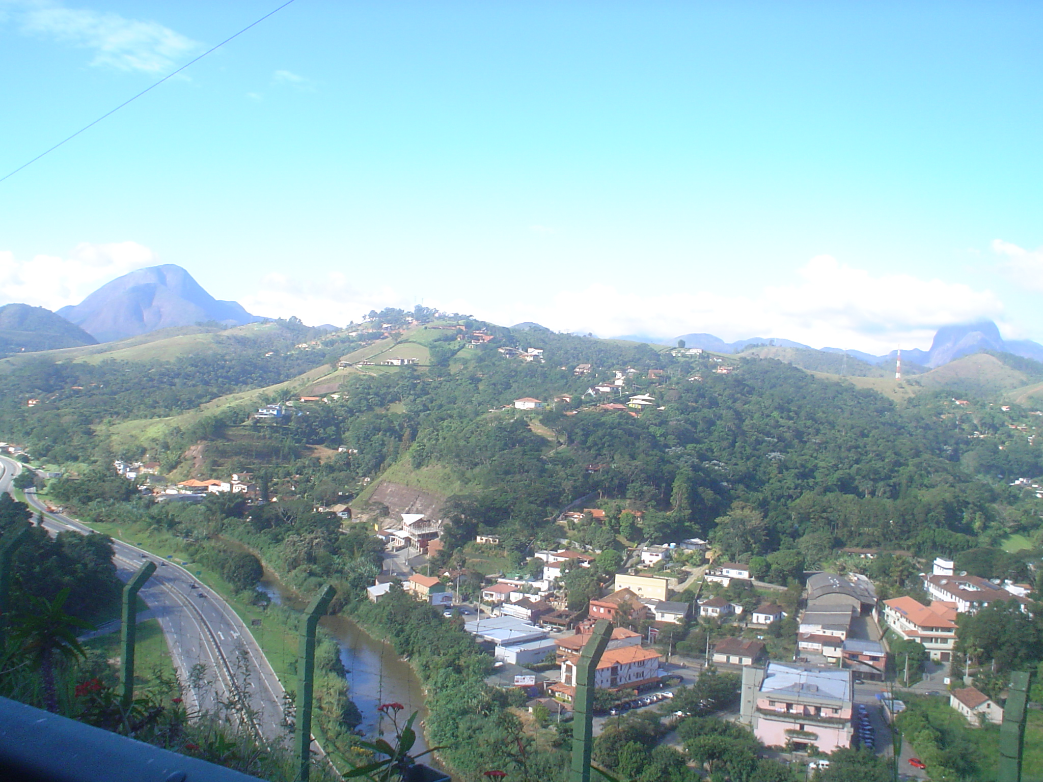 Itaipava